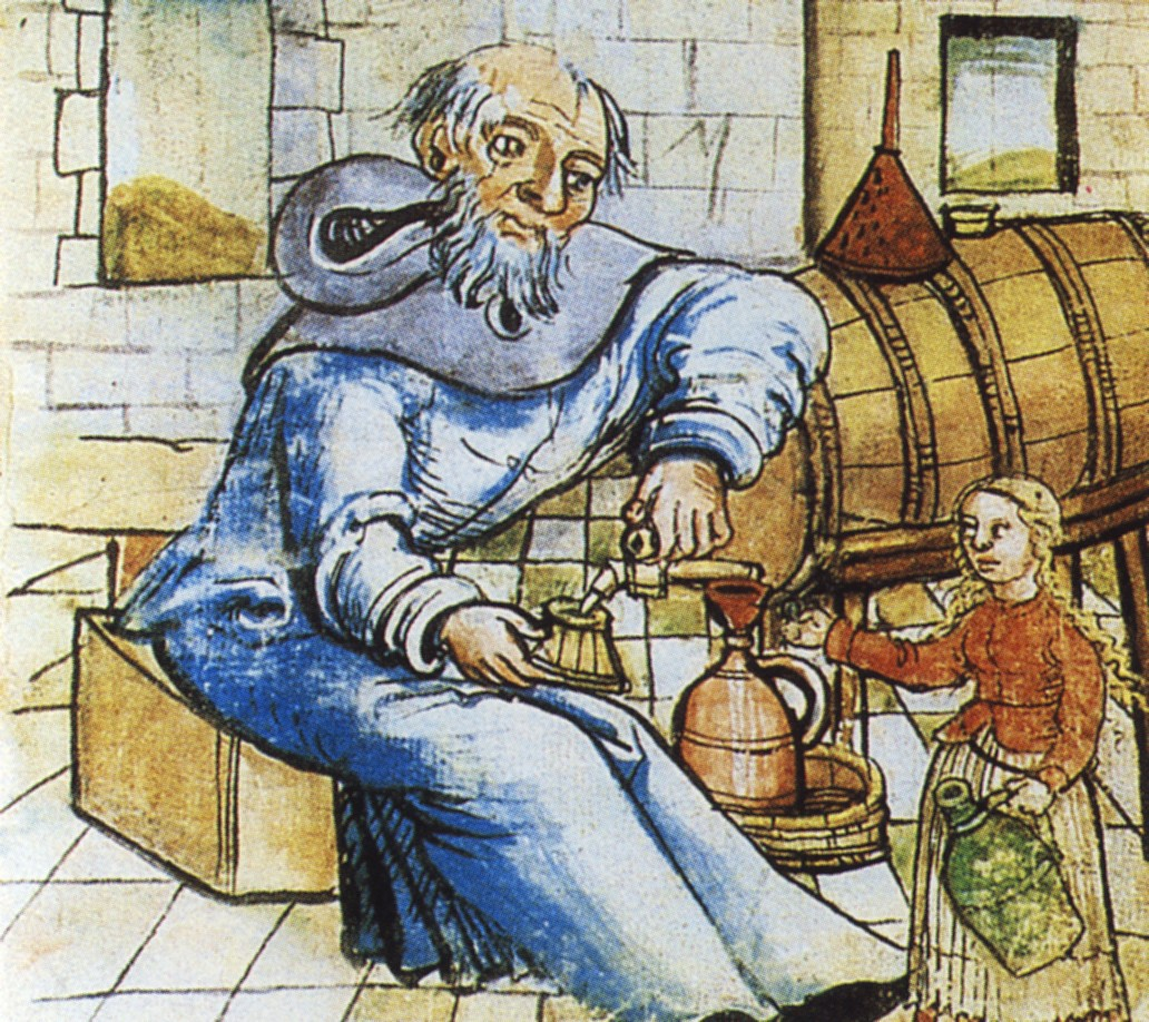 En vinman (vinhandlare) på medeltiden